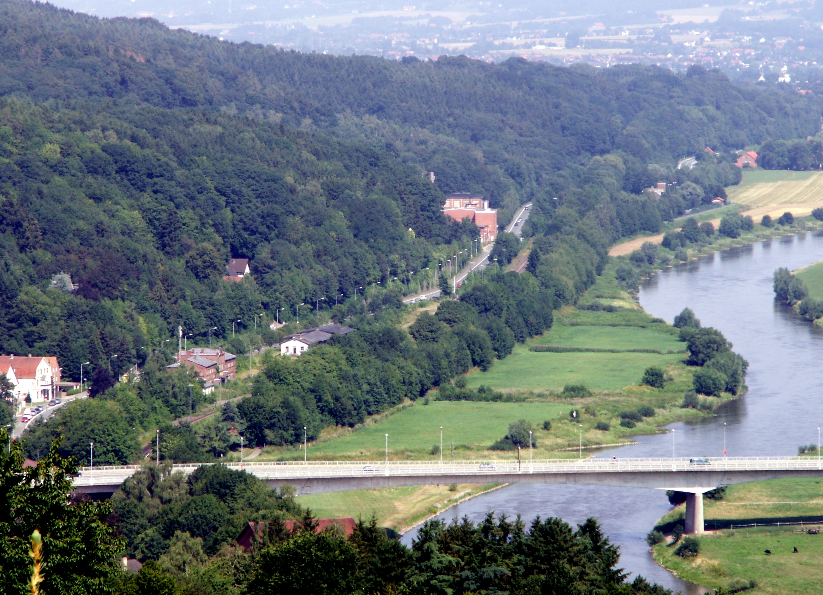 Verlauf der B514 auf Vlothoer Gebiet von Höhe Rathaus (links, nicht mehr im Bild) bis Stadtgrenze Bad Oeynhausen (rechts) vor Amtshausberg und Steinberg (Weserbergland)